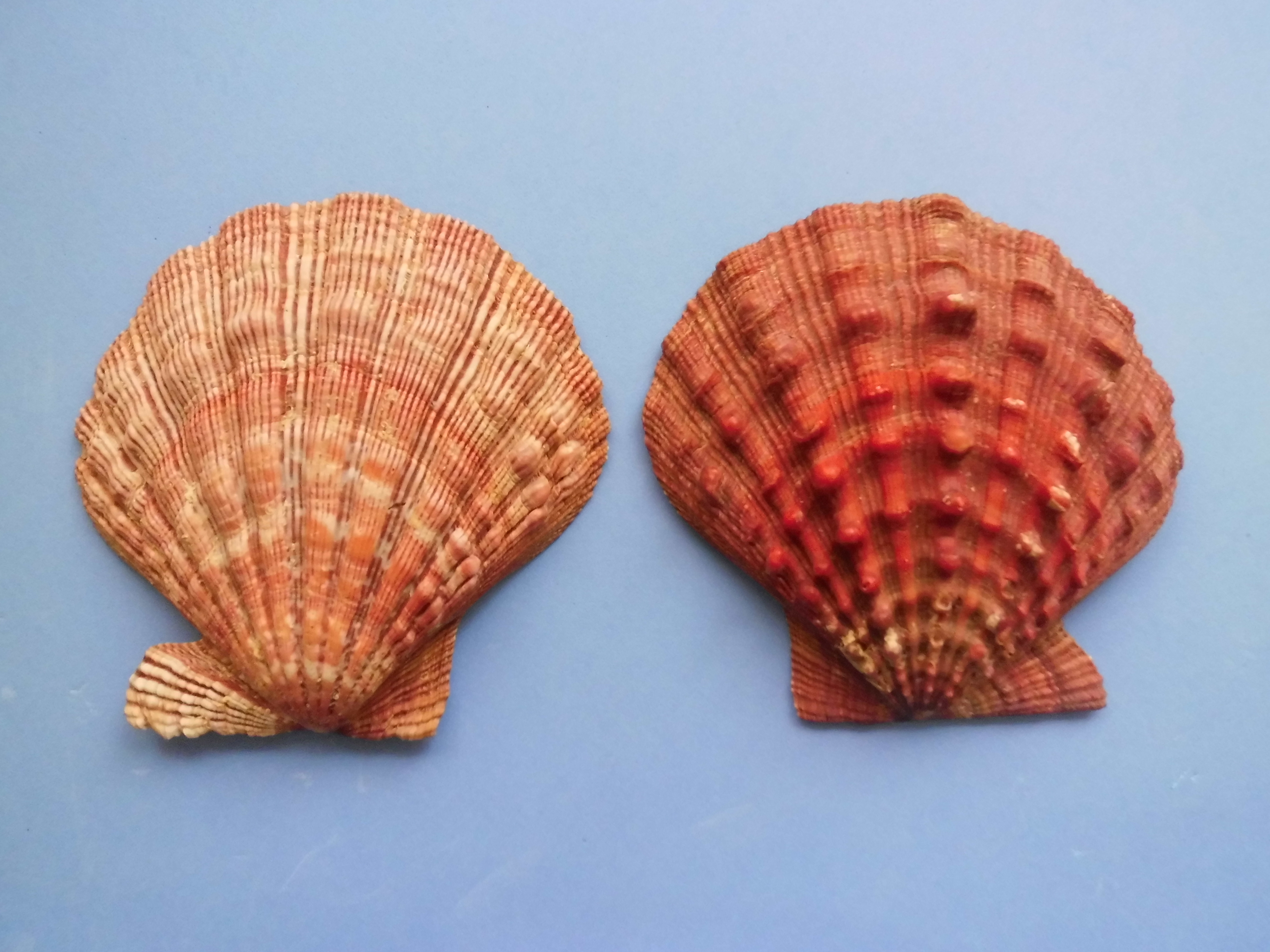 Nodipecten nodosus (Linnaeus, 1758) colectado en 2003 Puerto La Cruz, estado Anzoátegui - Venezuela